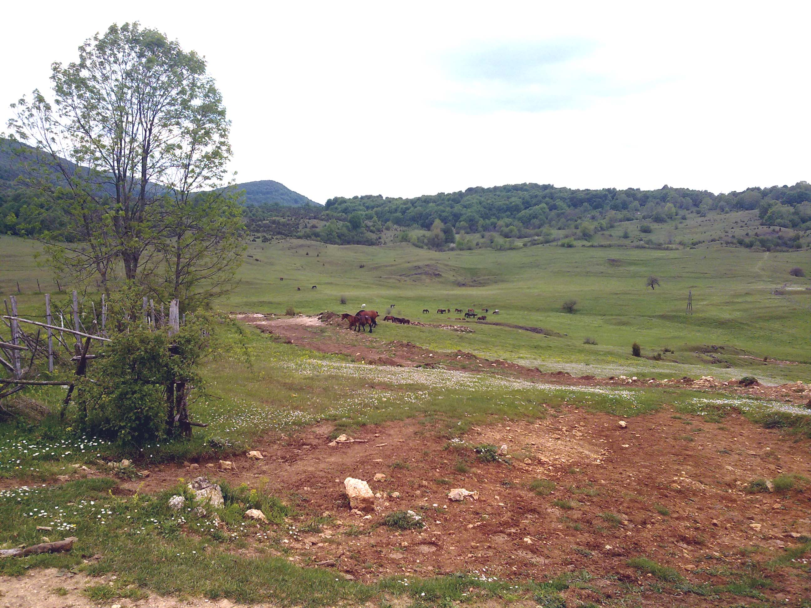 Sokolovo